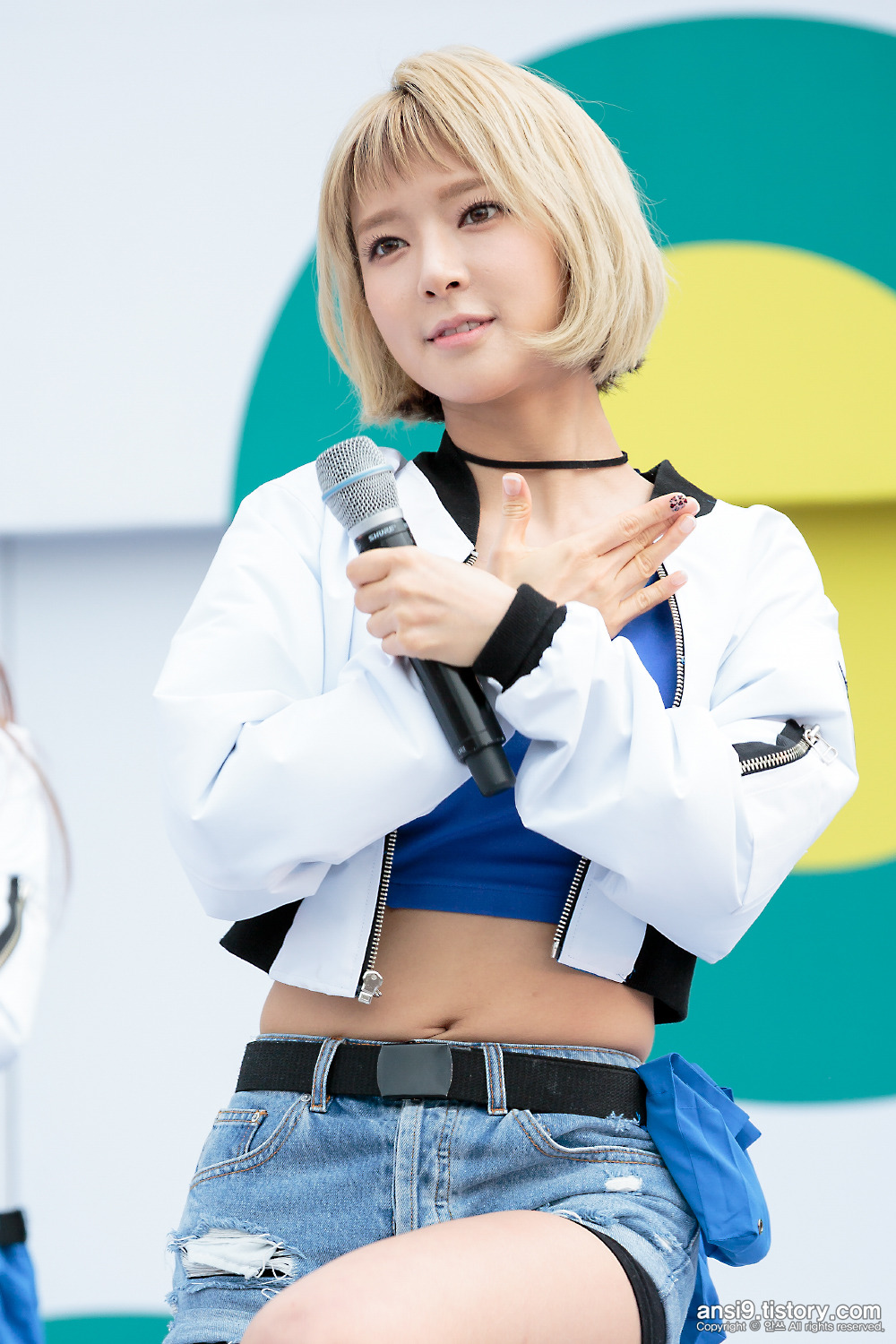 16.10.01 한돈데이 AOA 초아 (4)